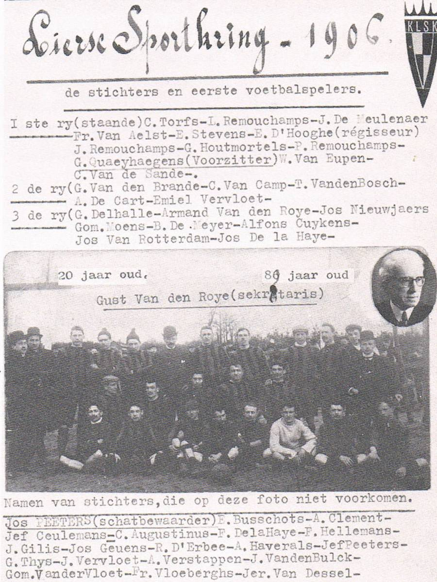 lierse oprichting ploeg 1906